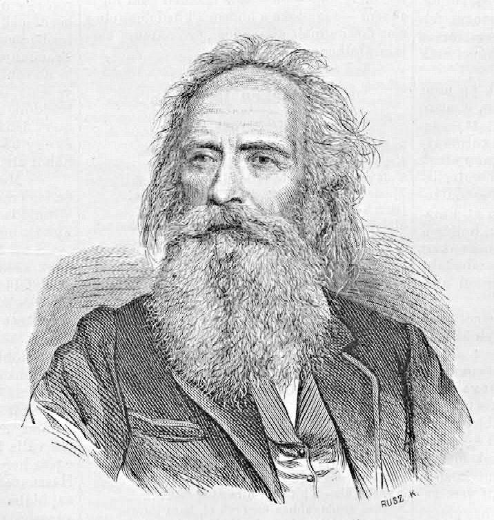 Ujházy László (1793–1870) politikus, Új-Buda alapítója. Rusz Károly metszete (Vasárnapi Ujság, 1868. november 22.)